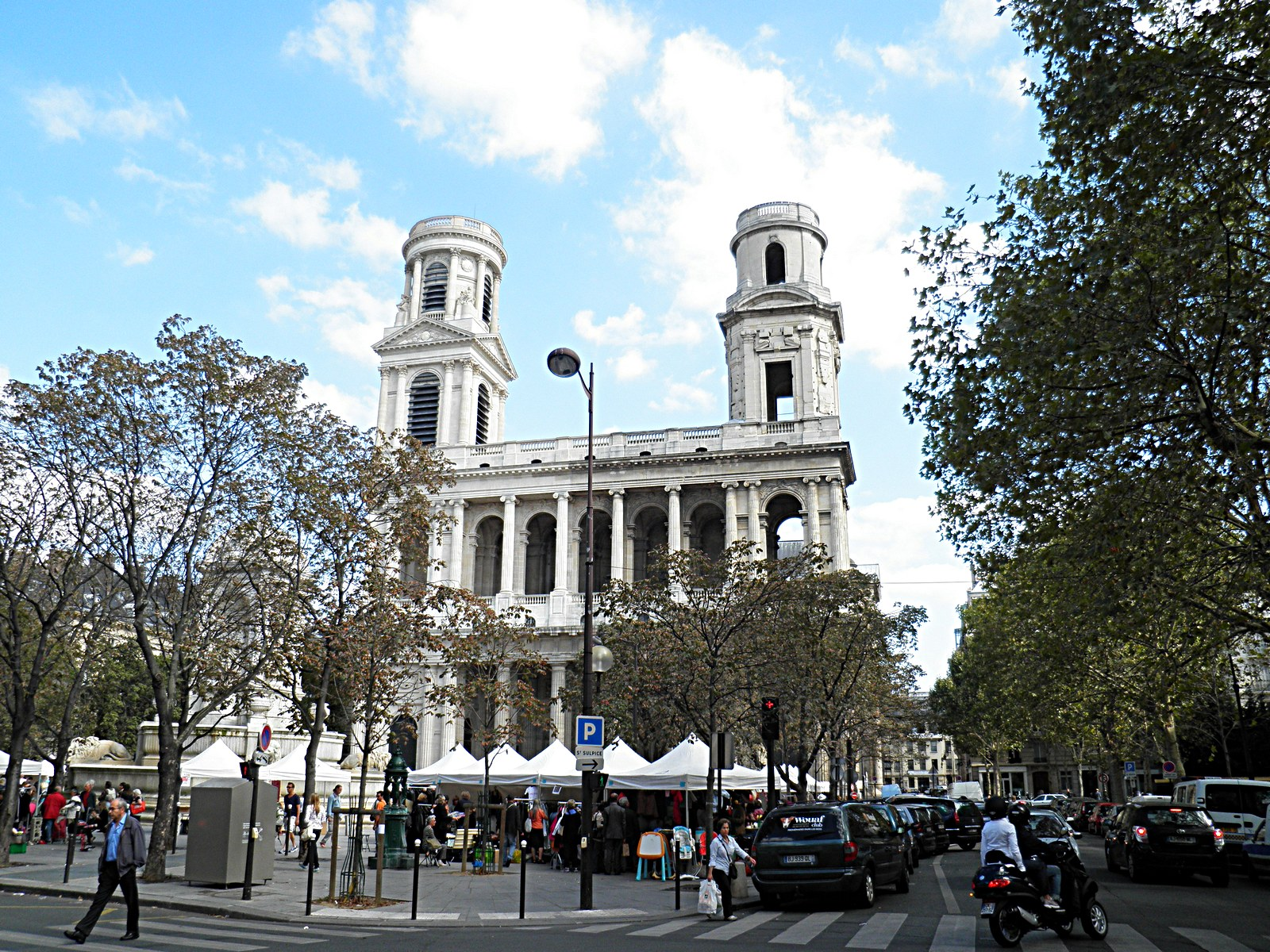 Église Saint-Sulpice